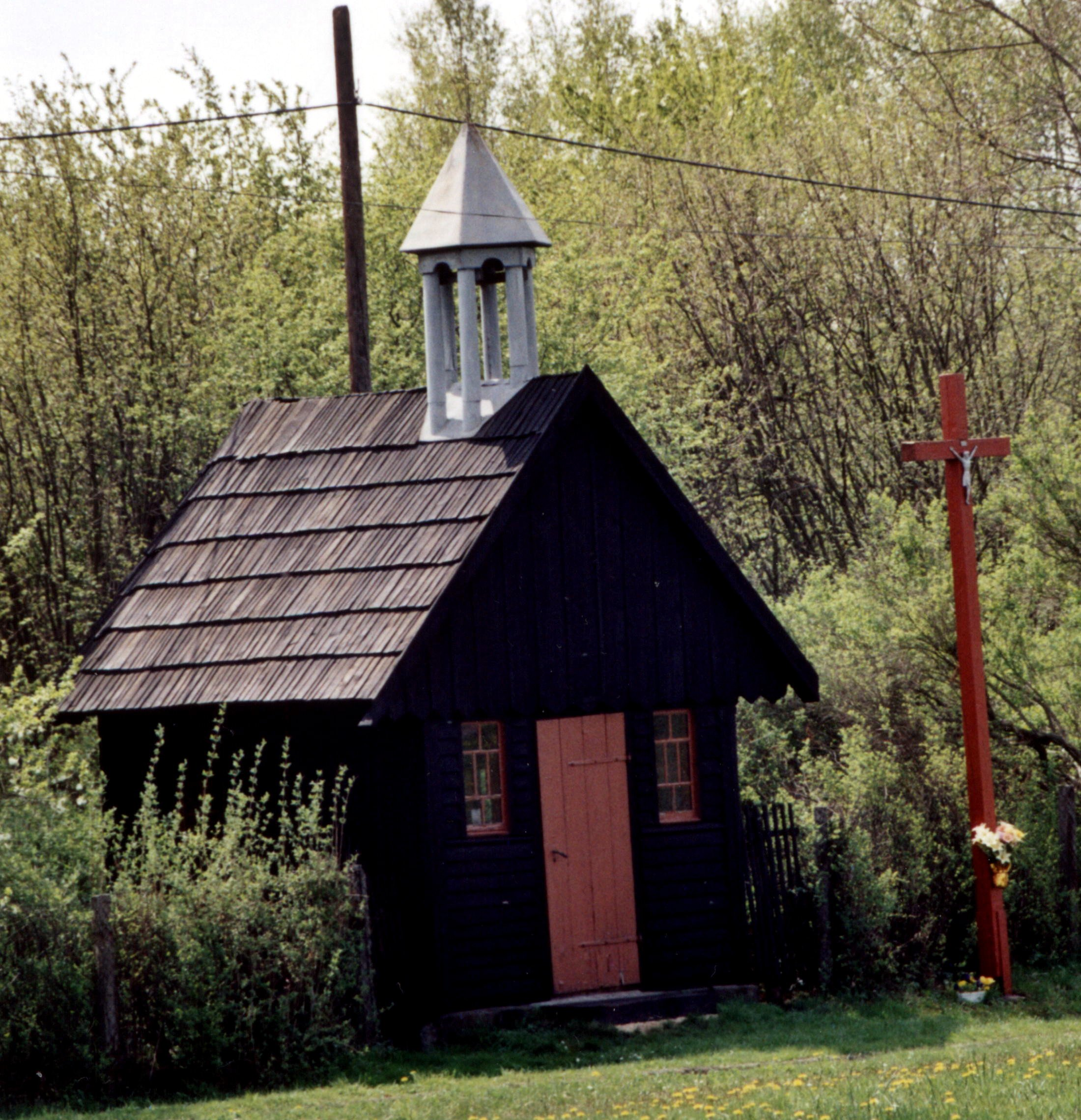 kapliczka Jana Nepomucena w Dębowej Górze, gmina Boronów